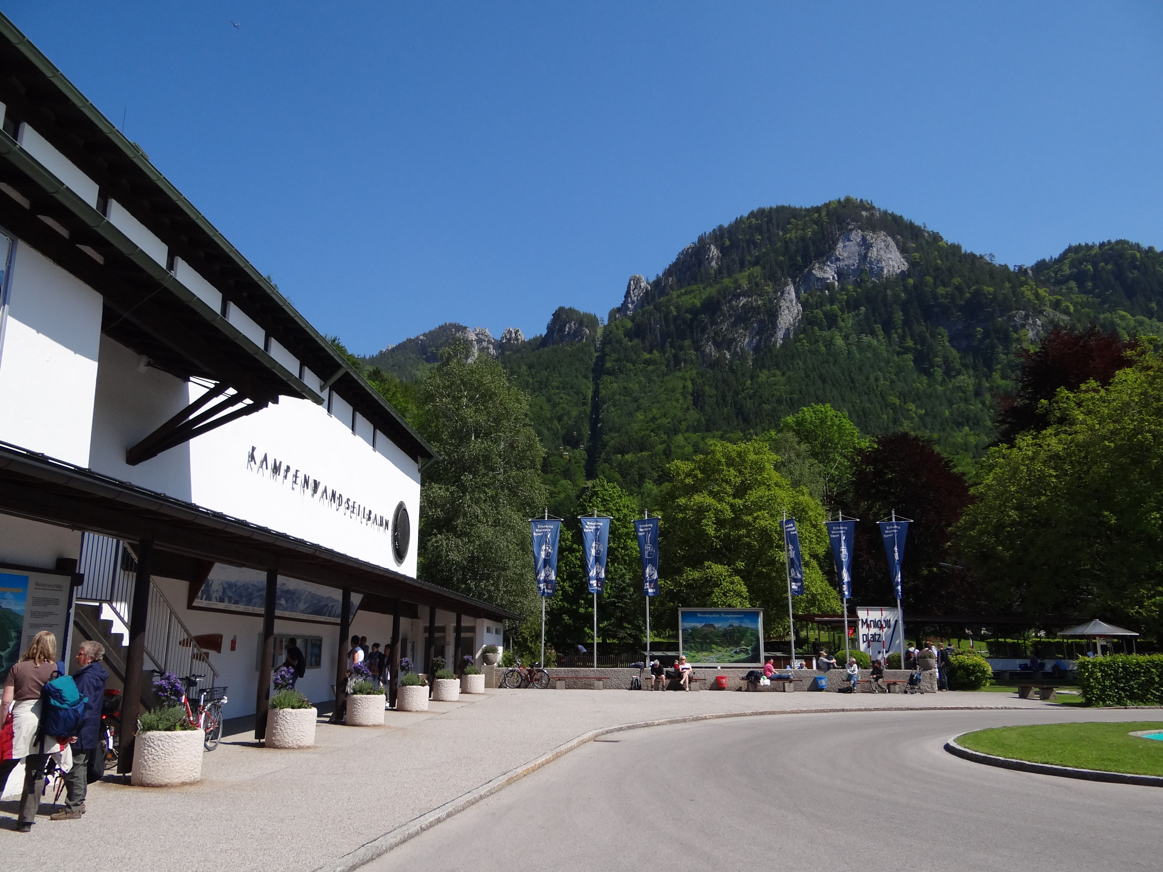 Hohenaschau im Chiemgau, 83229 Aschau im Chiemgau, Germany